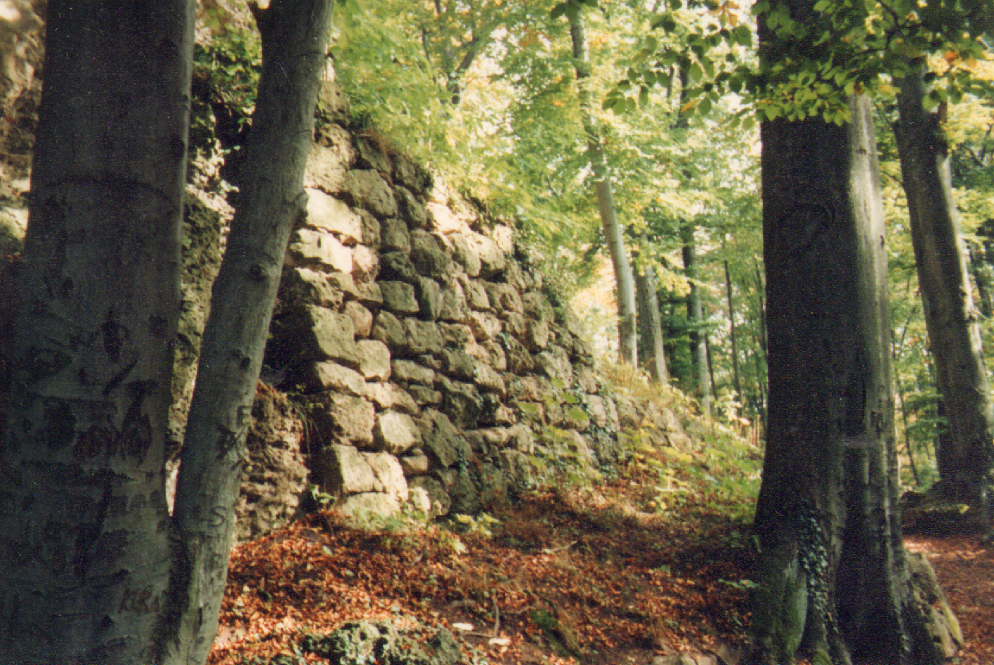 Mauerreste der Neuenburg am Bonifatiusfelsen im Altensteiner Park.